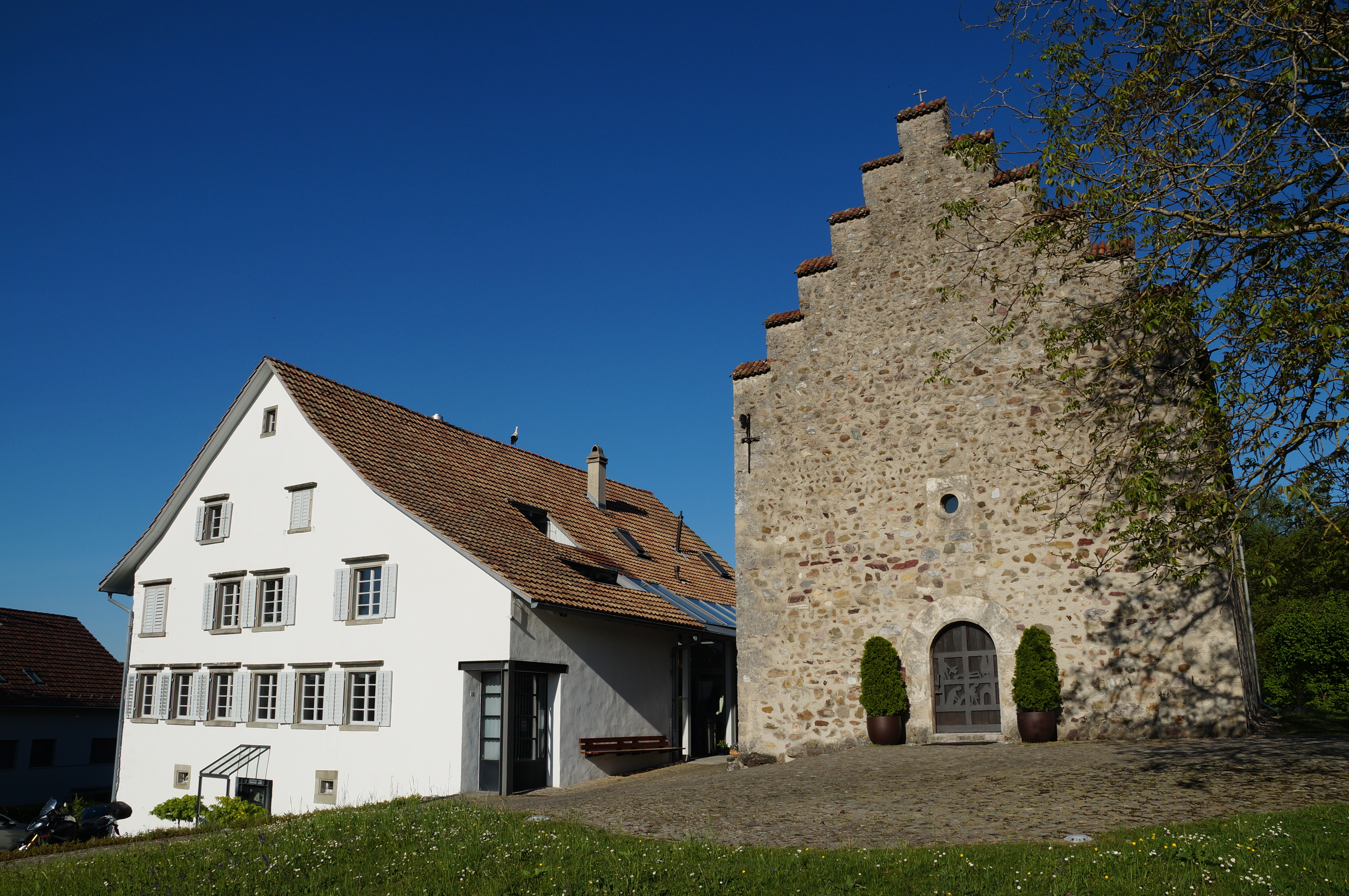 Lazariterkirche Gfenn, Dübendorf ZH, Schweiz